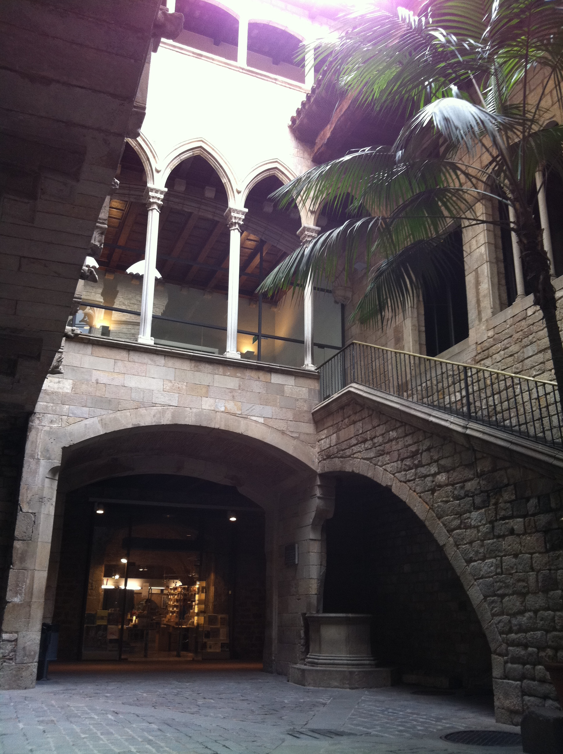 Palau Aguilar, seu del museu Picasso